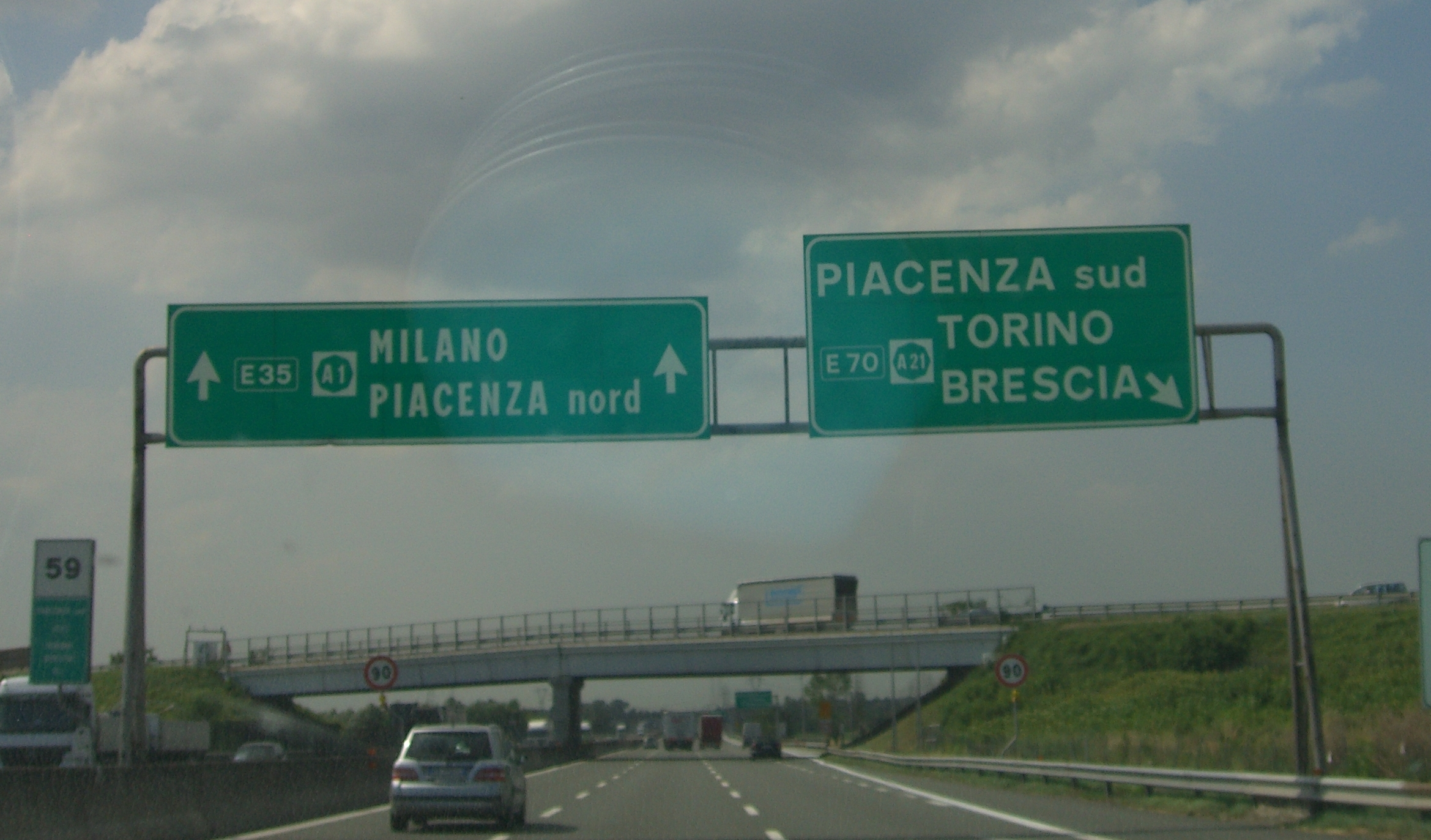 A1-A21